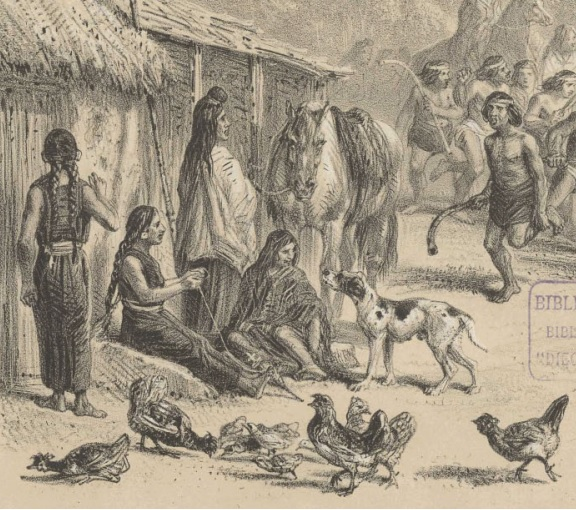 Escena Mapuche durante juego de la Chueca en Atlas de la Historia Física y Política de Chile, Tomo Primero. Claudio Gay (1854)